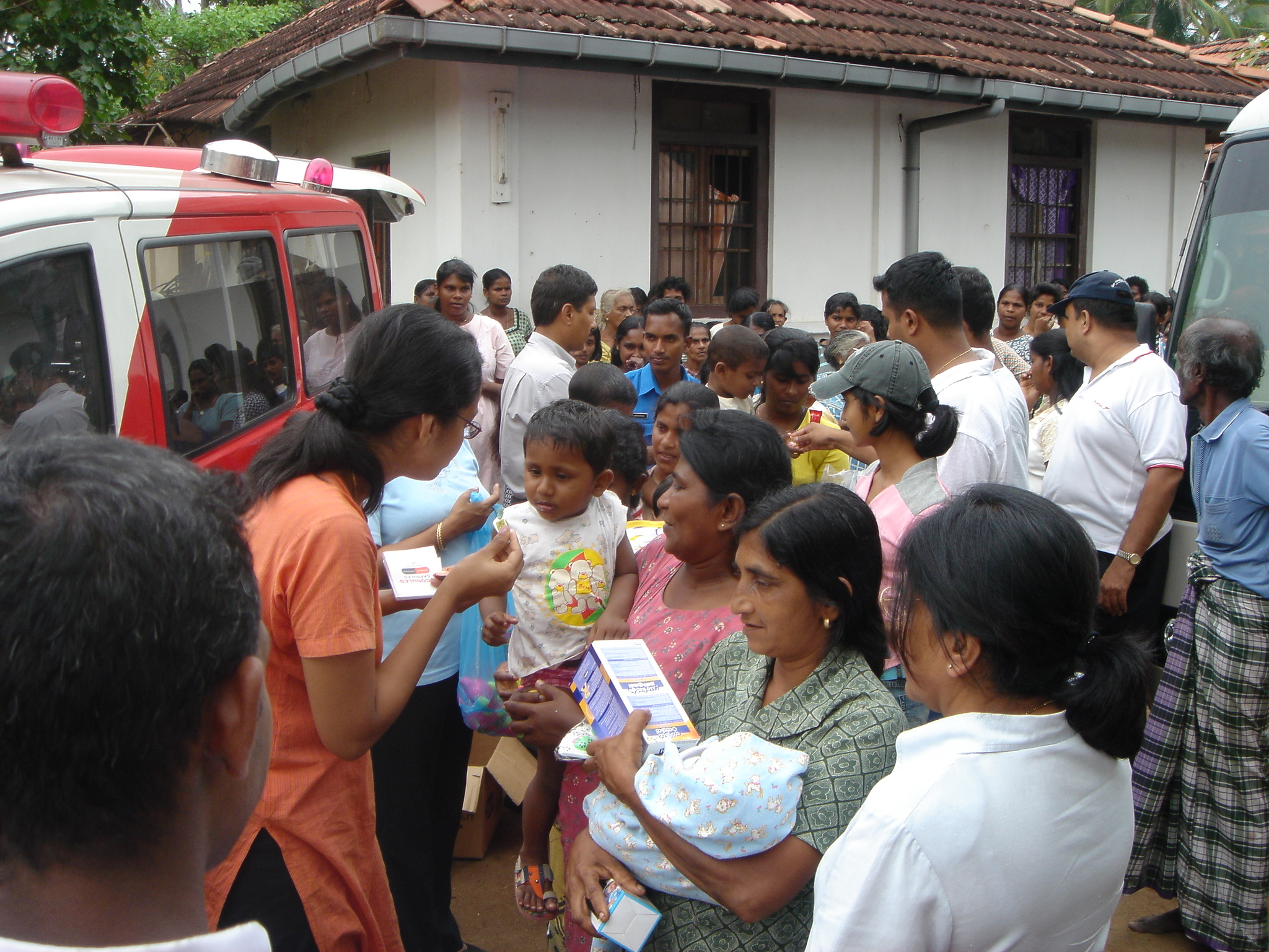 Sprechstunde bei einem Landarzt in Sri Lanka. ລາວ: ແພດຊຸມຊົນ.